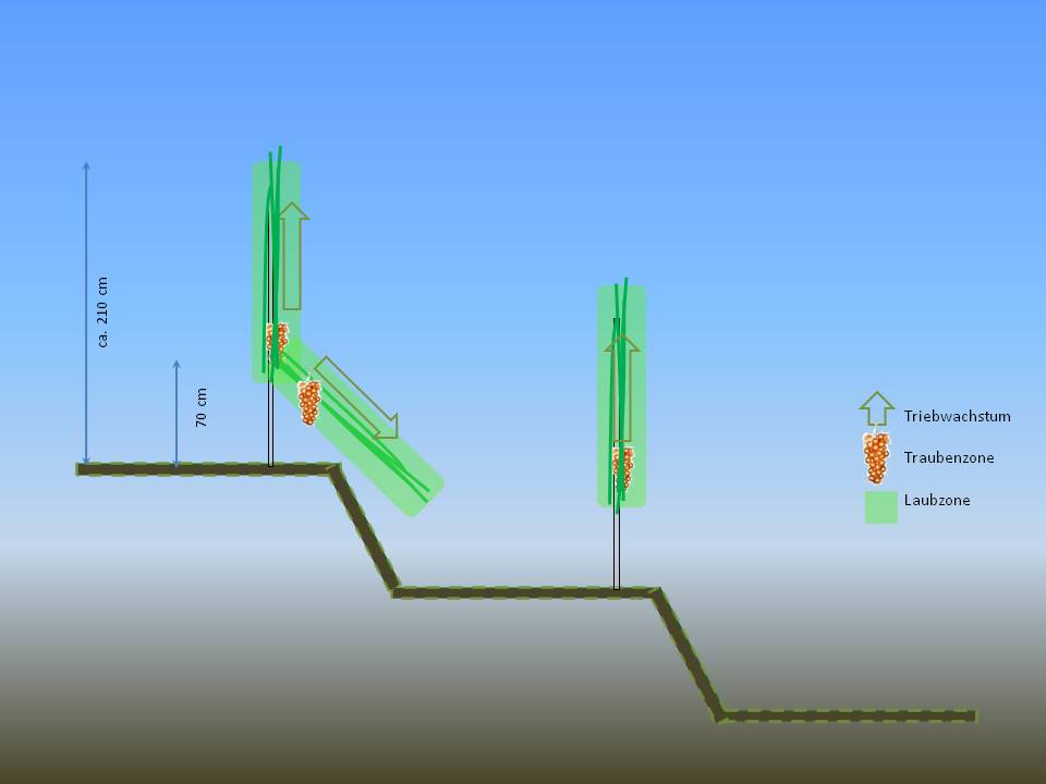 Spaliererziehung auf steilen Terrassenlagen, verschiedenen Anordnung der Triebe